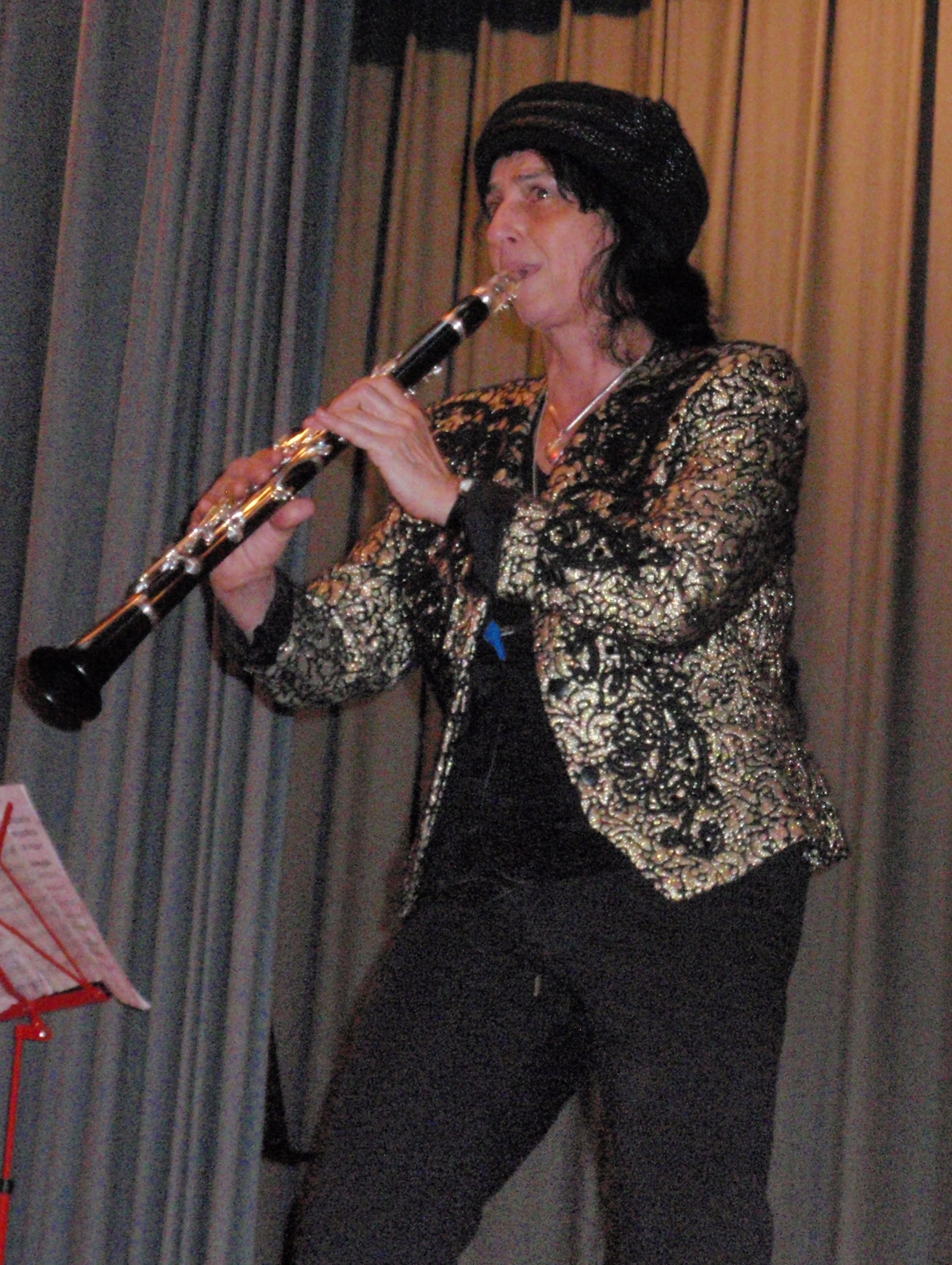 die Klezmer-Klarinettistin Irith Gabriely im November 2008 während eines Konzerts in Alsbach-Hähnlein, Hessen